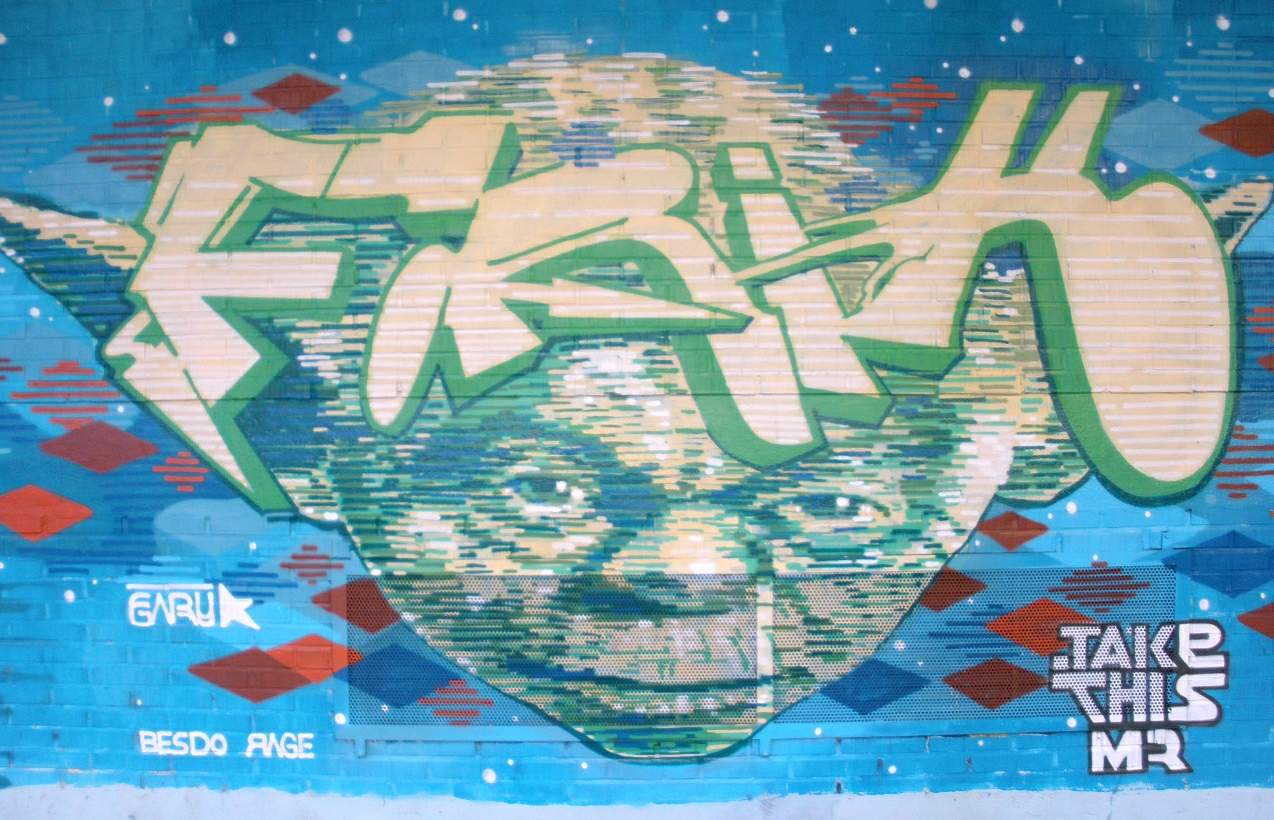 Graffiti en Vitoria